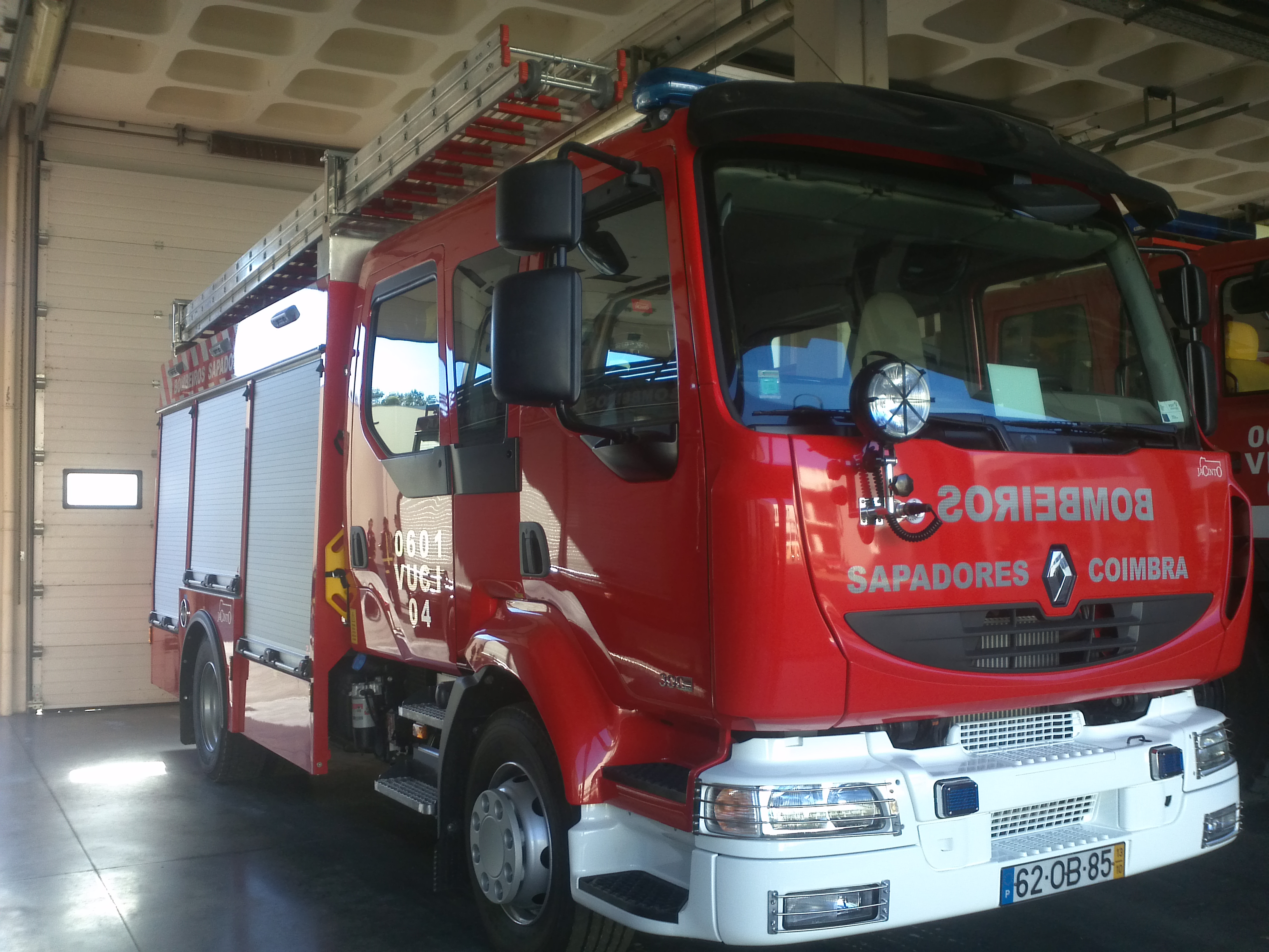 Veiculo Urbano de Combate a Incêndios 04